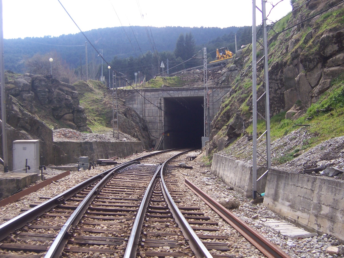 Esta es una fotografía de la entrada (o salida, según de donde se venga) del túnel antiguo de Guadarrama en su parte madrileña. Esta fotografía la hice yo mismo el 3 de abril de 2007. En este caso la cedo amablemente a wikipedia para su enciclopédico uso.